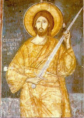 Христос з мечем в руках. Фреска XIV століття в монастирі Високі Дечани. Сербія. Косово